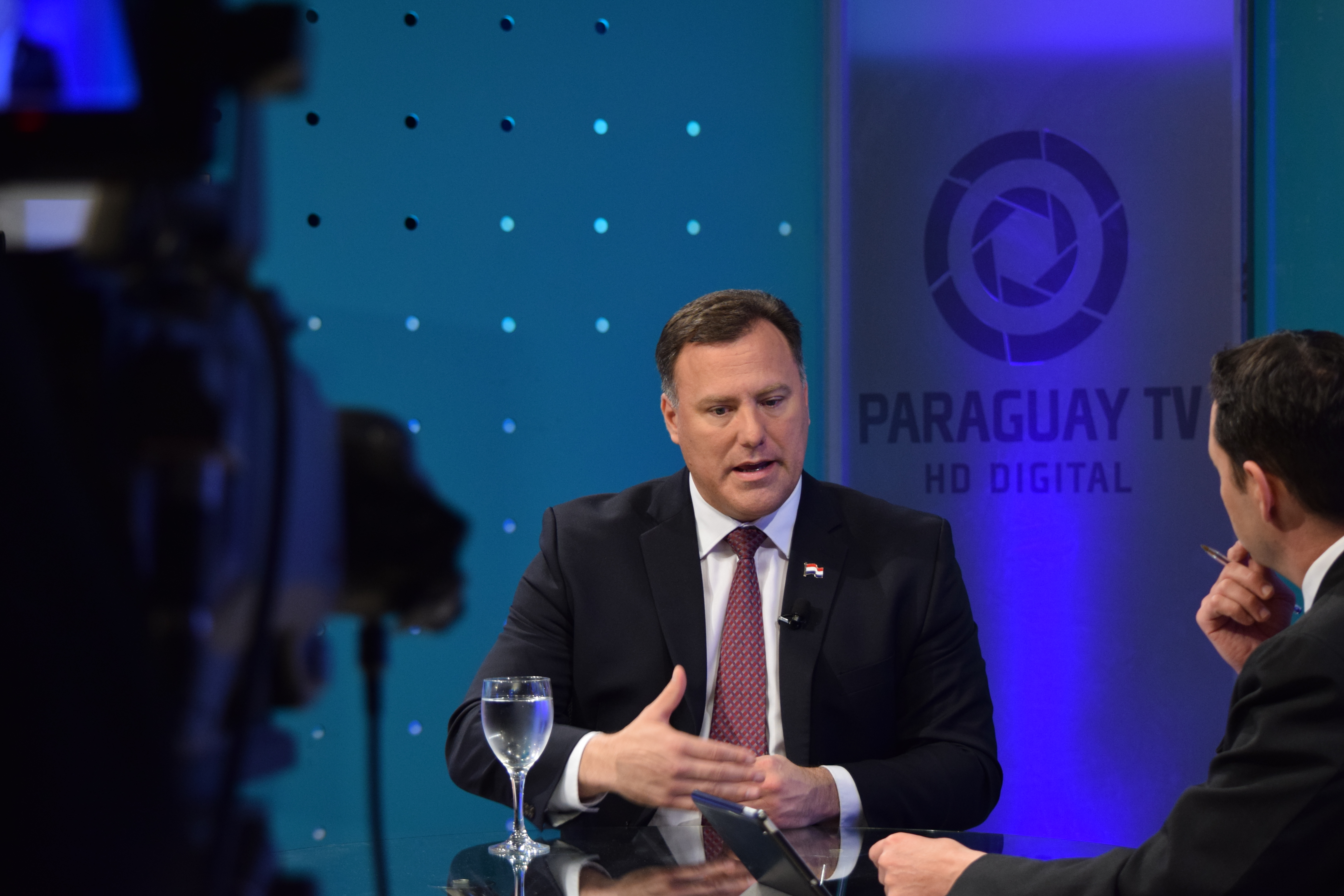 Ministro de obras en los estudios del canal